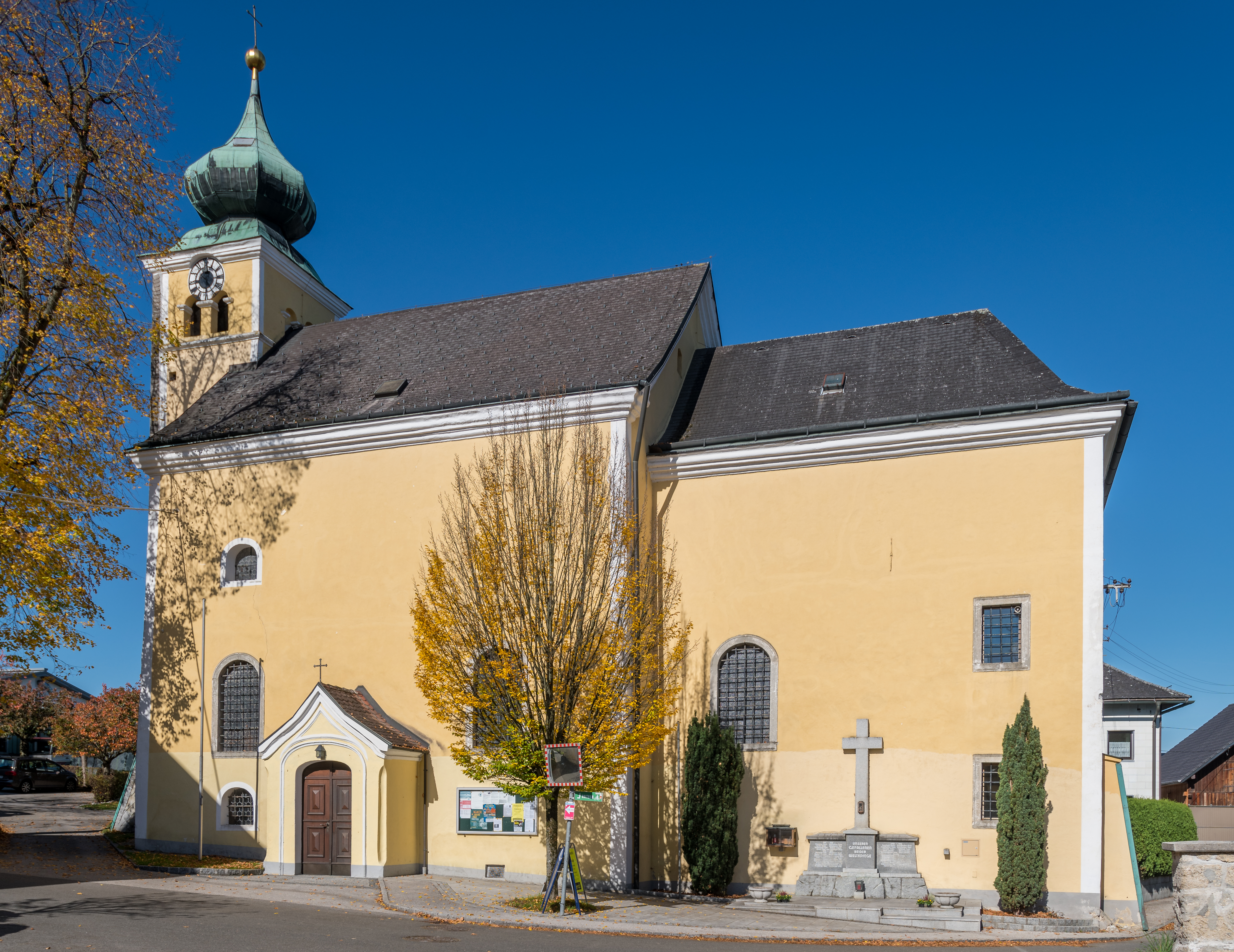 Pfarrkirche Lindach (Laakirchen)